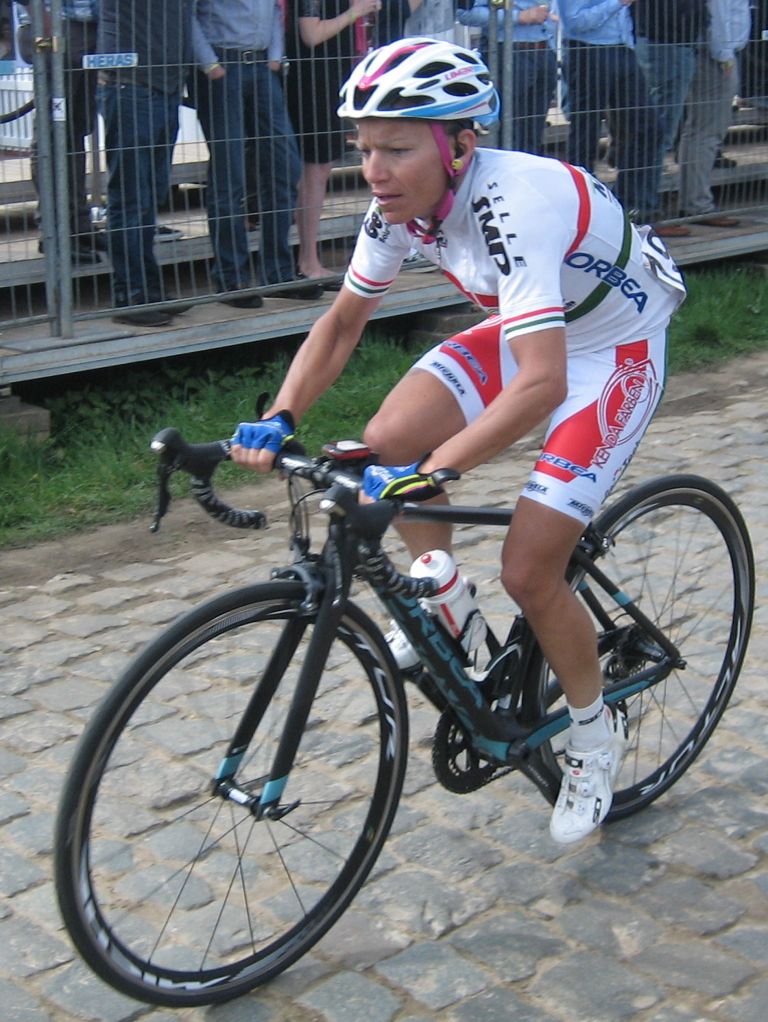 Mónika Király op de Oude Kwaremont in de Ronde van Vlaanderen voor vrouwen 2017.